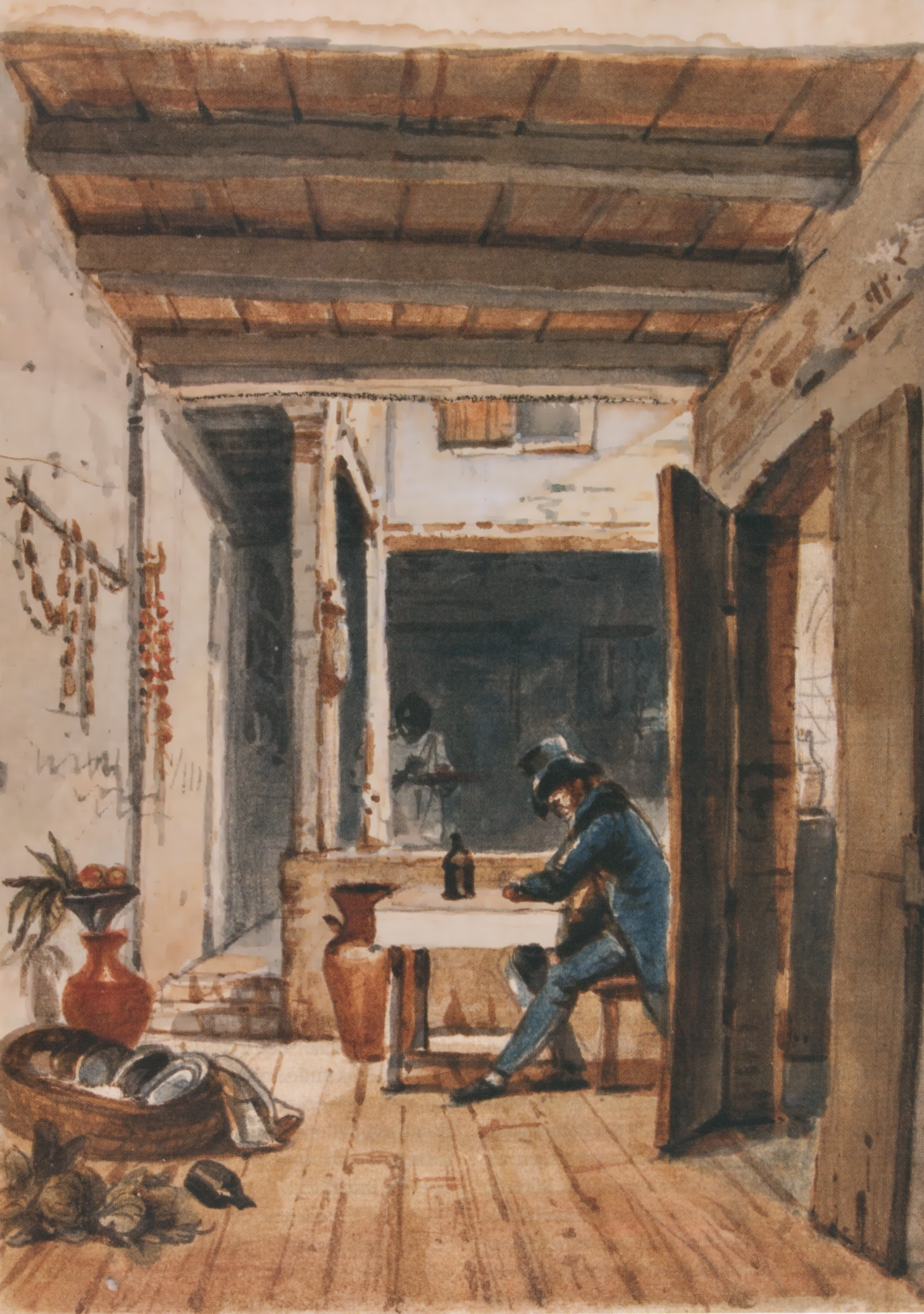 Aquarela de Debret, onde este retrata a si próprio numa estalagem.